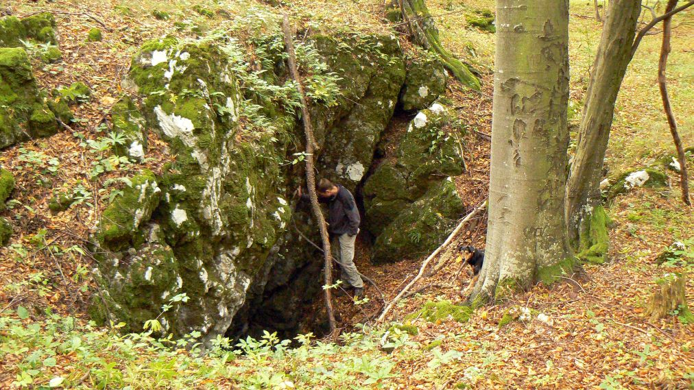 Borovičková priepasť. 14 m hlboká zvislá jaskyňa s rozsadlinovo-koróznym vývojom leží v blízkosti južnej hrany planiny. Krasový reliéf v tunajšom okolí postihli gravitačné deformácie, v dôsledku ktorých vzniká práve tento typ jaskýň.